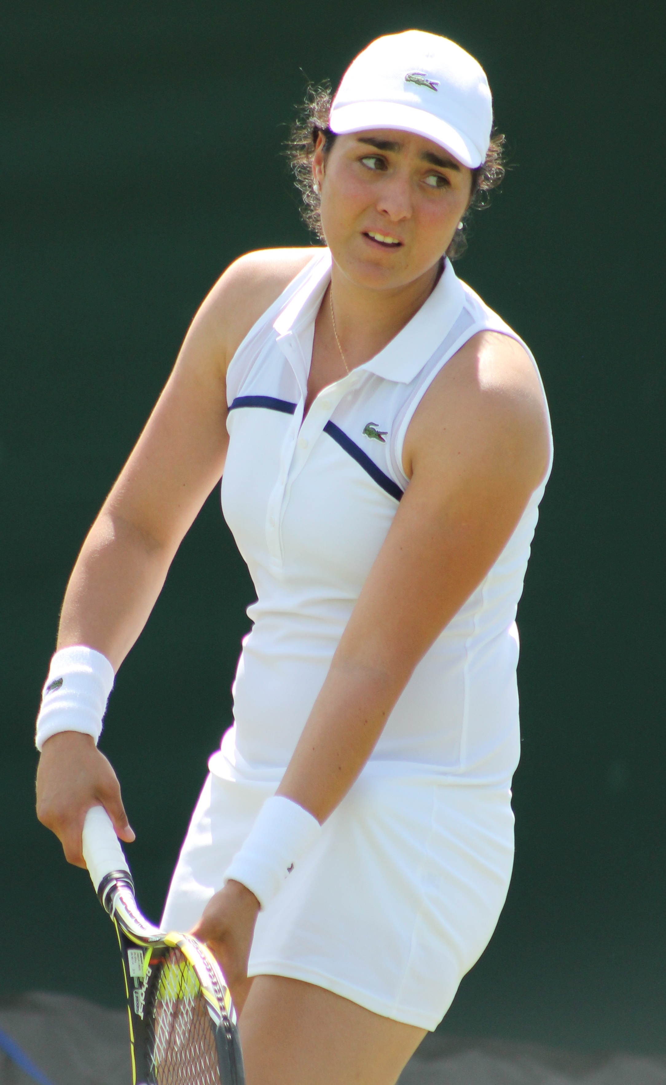 Jabeur WMQ14 (7)